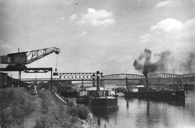 Magdeburg, Hafen, Kohleverladeanlage Illus Biscan 20.9.1951 Zwischenstation auf dem Weg von Prag nach Hamburg. Die tschechoslowakischen Elbe- Schiffahrtsgesellschaft (CSPL) hat in Magdeburg eine Niederlassung eingerichtet, die von allen Schleppzügen angelaufen wird, die entweder mit Exportgütern auf dem Wege nach Hamburg sind oder von dort Importgüter nach der CSR bringen. UBz: Anlage zur Übernahme von Kohlen. Die Bebunkerungsanlage der CSPL in Magdeburg ist die größte und leistungsfähigste. Unsere tschechoslowakischen Freunden stellen sie daher auch der deutschen Schiffahrt zur Verfügung.